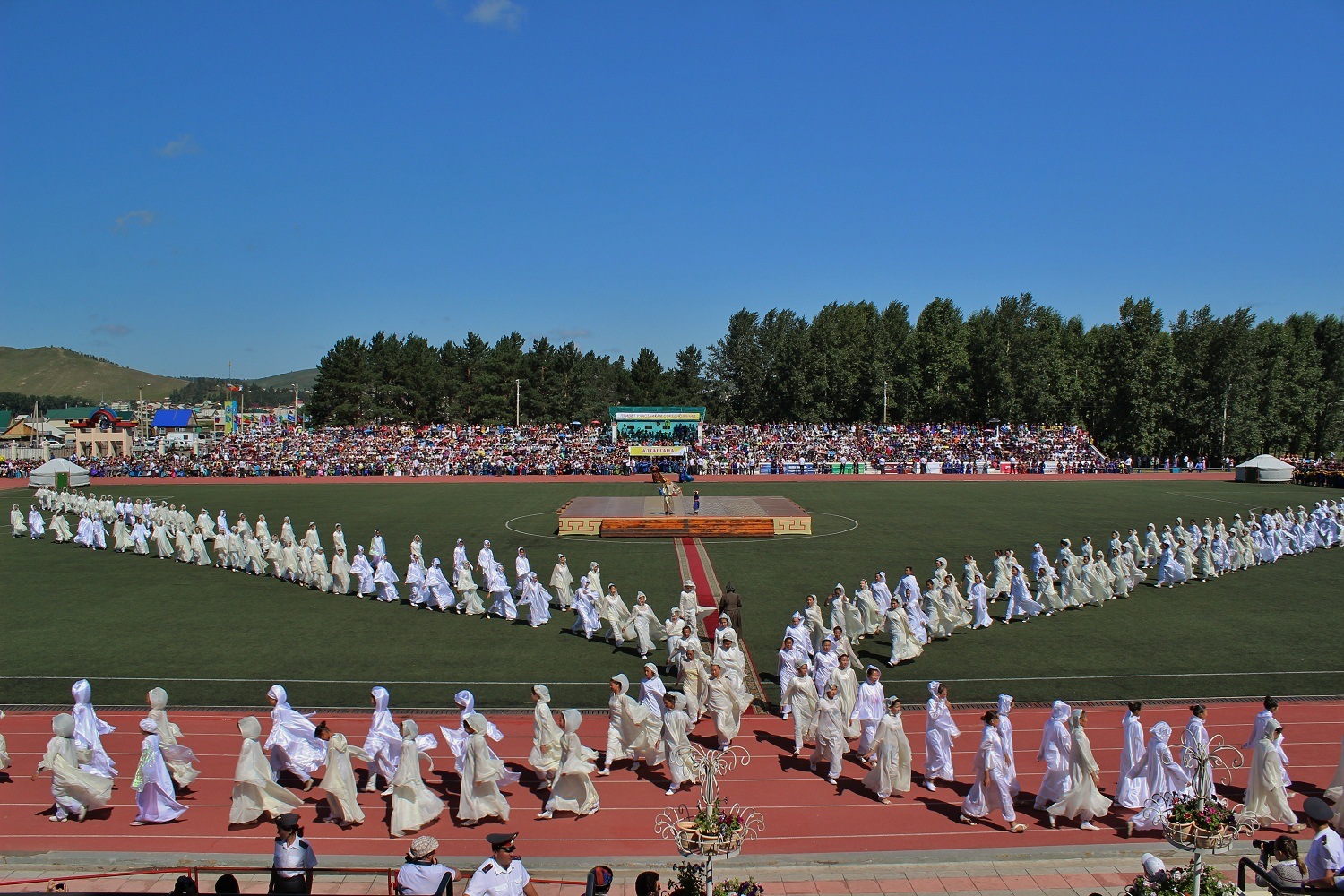 Фестиваль бурятской культуры "Алтаргана-2012". Агинское, Забайкальский край